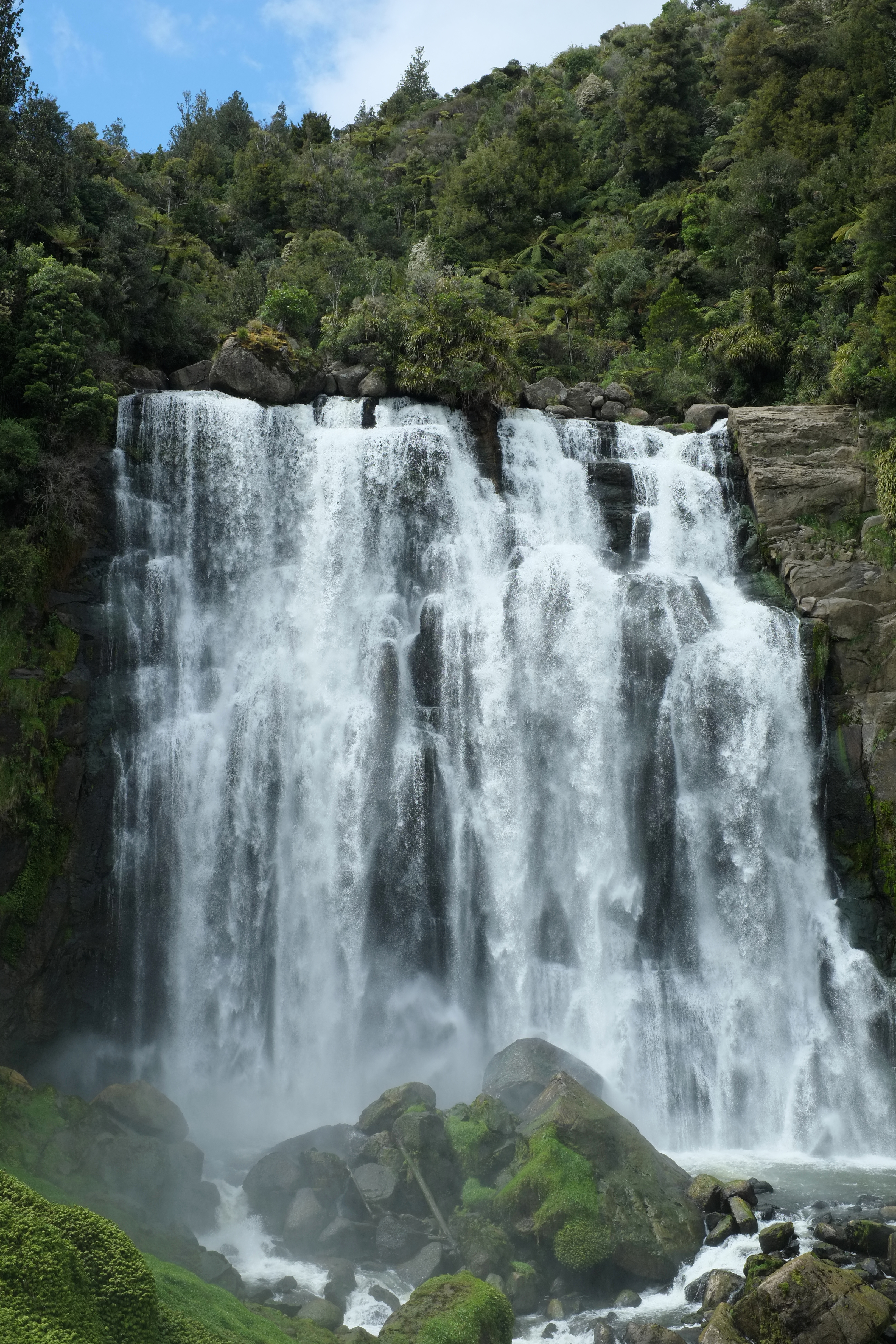 Marokopa Falls (Marokopa River)